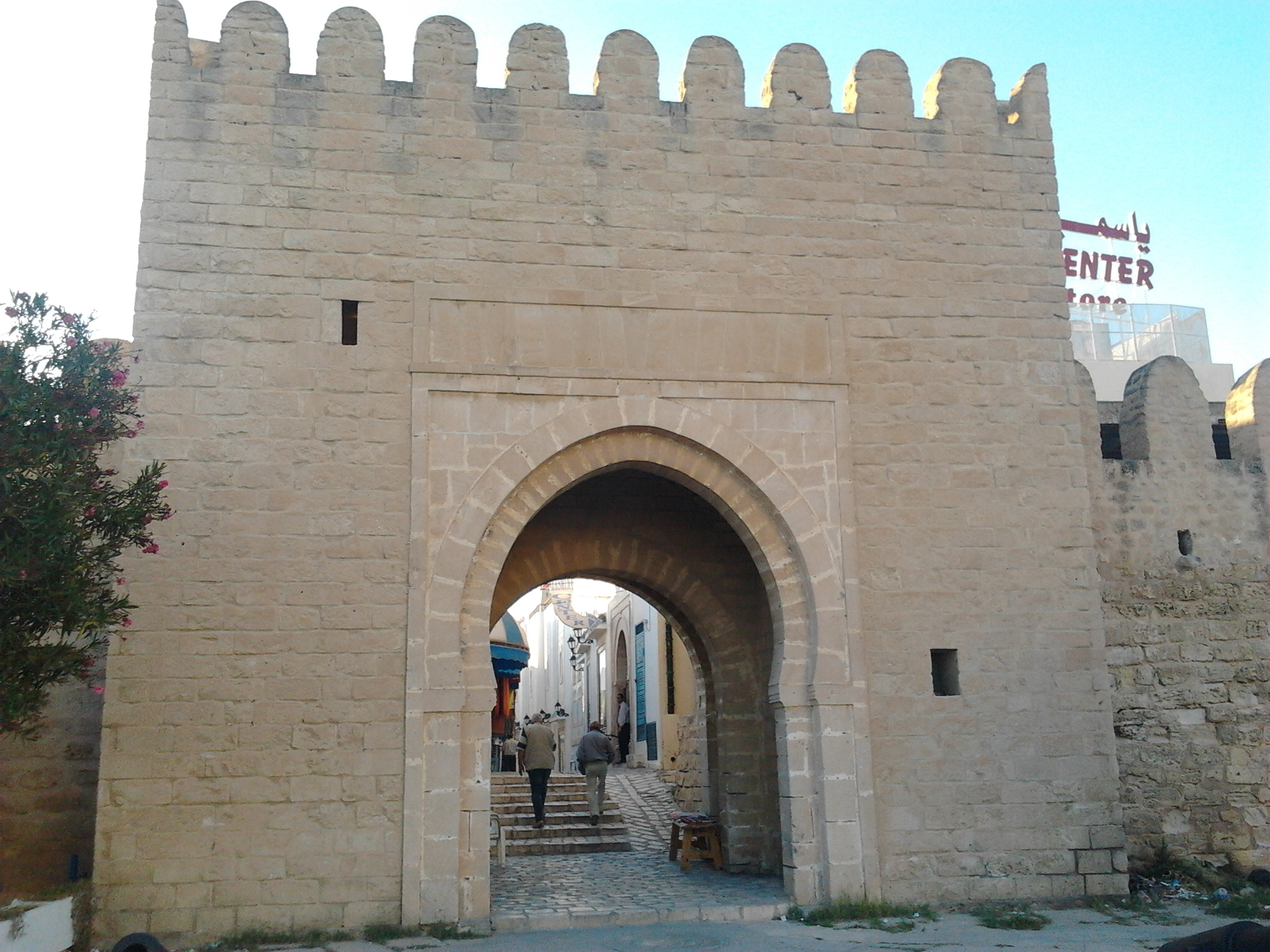 La Porte de "Houmét Dar Chraka" - Monastir